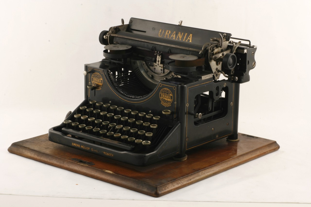 Macchina standard fissata ad una base rettangolare in legno; il telaio in ghisa verniciata di nero poggia su quattro piedini gommati circolari. La tastiera AZERTY presenta 42 tasti rotondi con bordi in plastica; la barra spaziatrice è in legno verniciato di nero. Il tasto del tabulatore è posto nella parte destra della tastiera; è presente un solo tasto delle maiuscole. Gli 84 caratteri sono montati sui martelletti riposanti nella cesta delle leve di forma semicircolare. Ai margini superiori della cesta sono collocate le due bobine del nastro inchiostrato; sul fianco sinistro della macchina è situata la leva per la selezione del colore del nastro. La macchina monta un carrello ospitante il rullo portacarta, rivestito di gomma; sul lato destro del carrello si trova la leva per il movimento di ritorno. Modalità d'uso L'abbassamento di un tasto aziona il cinematico e il martelletto portacaratteri scatta, colpendo il punto di battitura da posizione frontale. Il tasto delle maiuscole comanda il sollevamento del carrello portarullo. L'inchiostrazione avviene mediante nastro inchiostrato inserito in un sollevanastro. Attraverso un sistema di scappamento, il carrello portacarta compie uno spostamento ad ogni battuta di tasto, permettendo la composizione di una riga. La scrittura è pienamente visibile